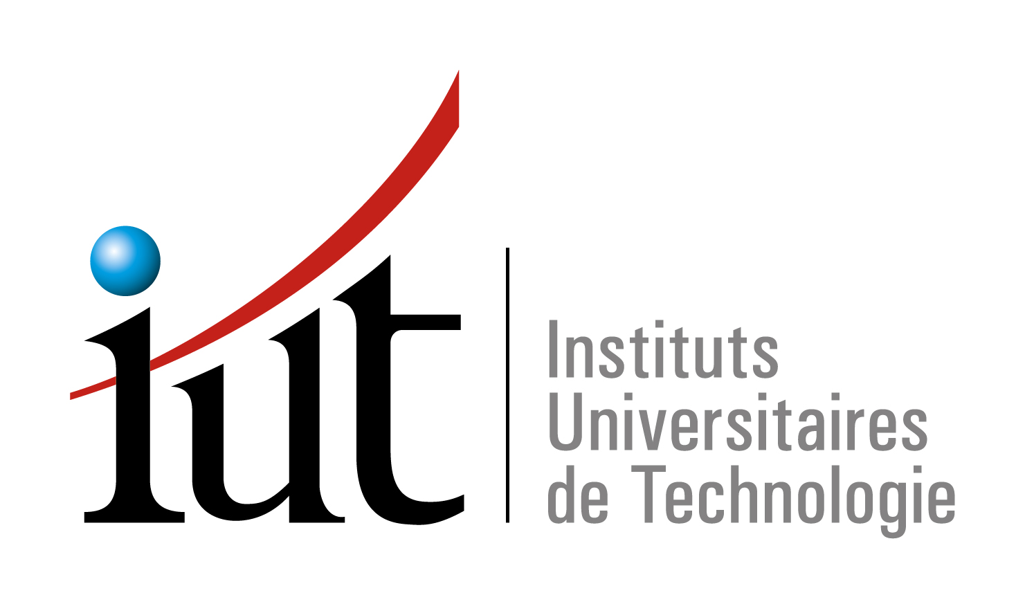 Logo de l'Association des directeurs d'IUT qui représente l'aspect juridique du réseau national des IUT